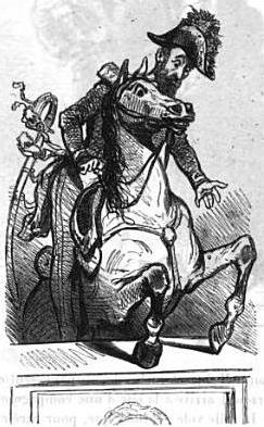 Caricature du général Jacques Léon Clément-Thomas (1809-1871) par Cham.